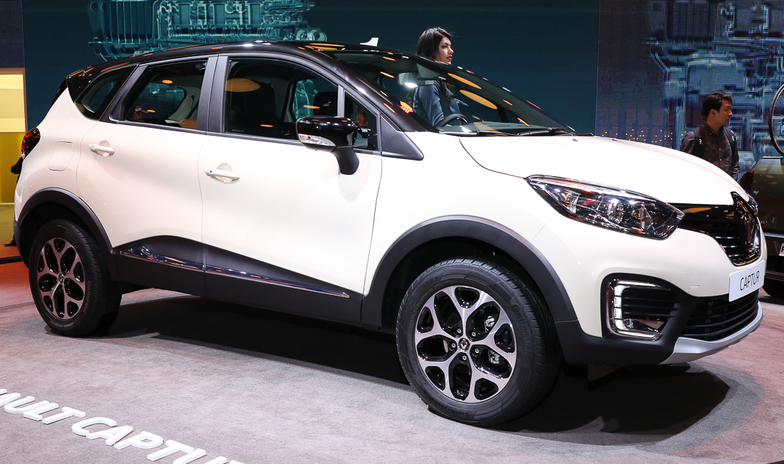 Salão do Automóvel 2016